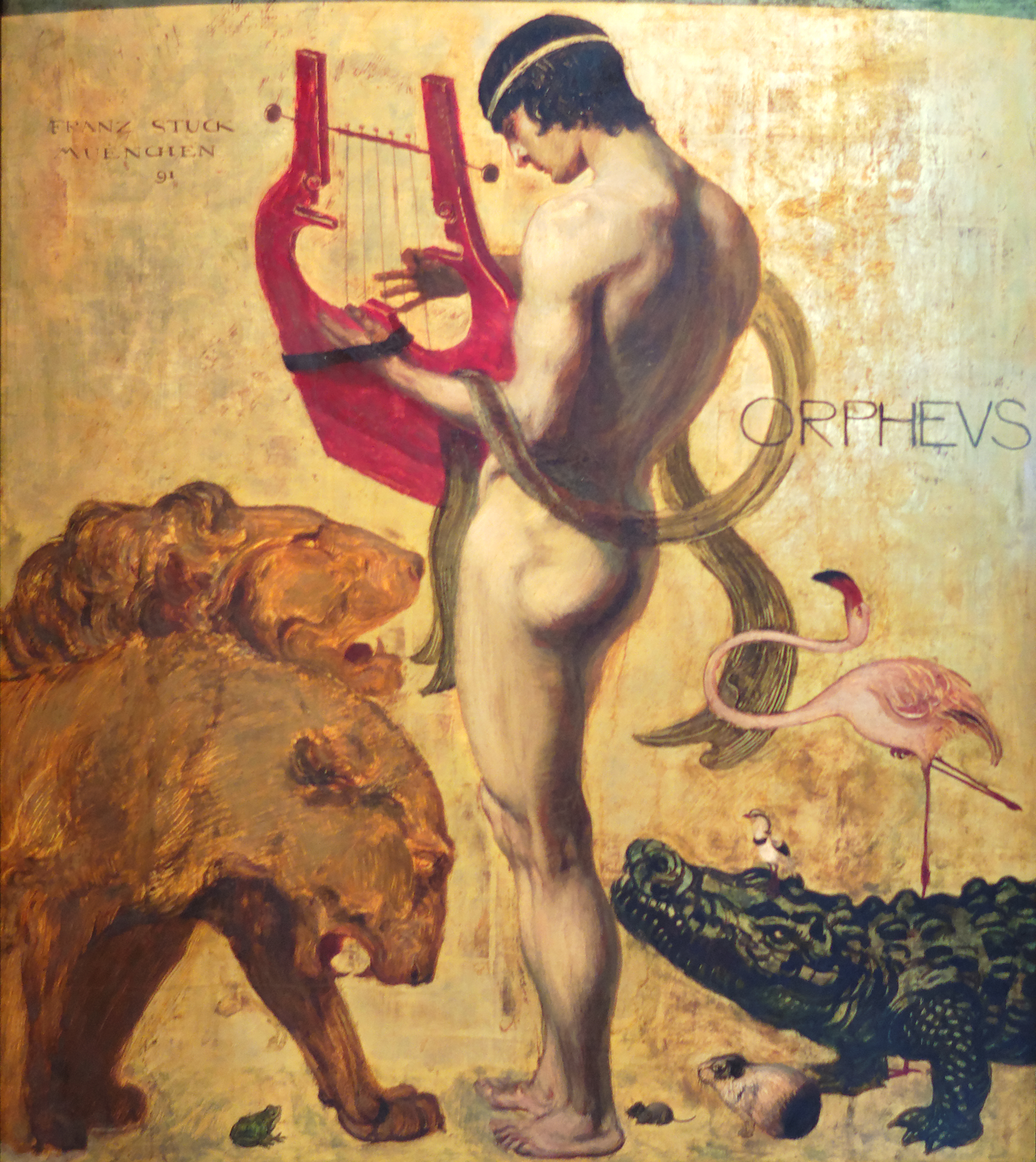 Orphée charmant les bêtes sauvages avec sa lyre, Franz von Stuck 1891. Musée de la villa Stuck, Munich